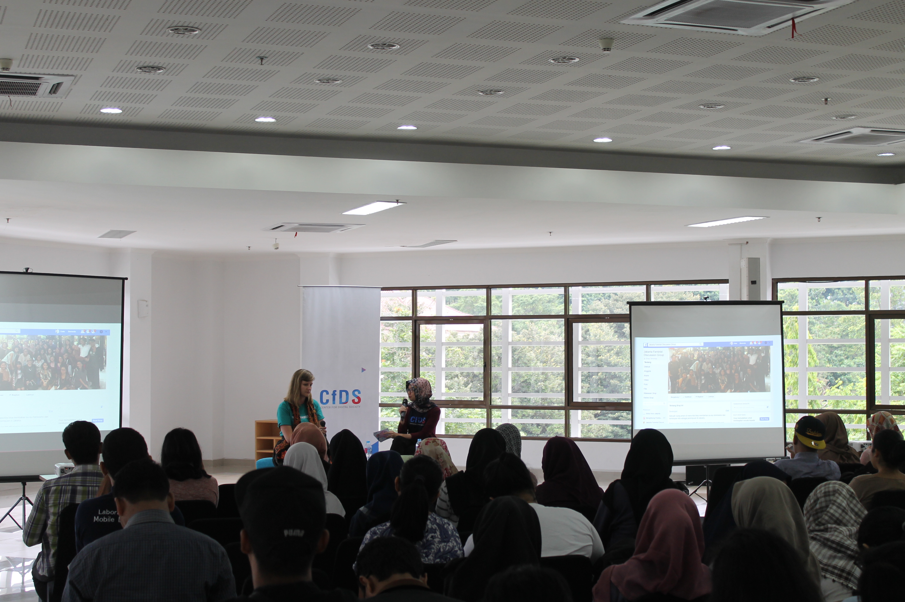 DigiTalk #15 Feminism and Digital Activism